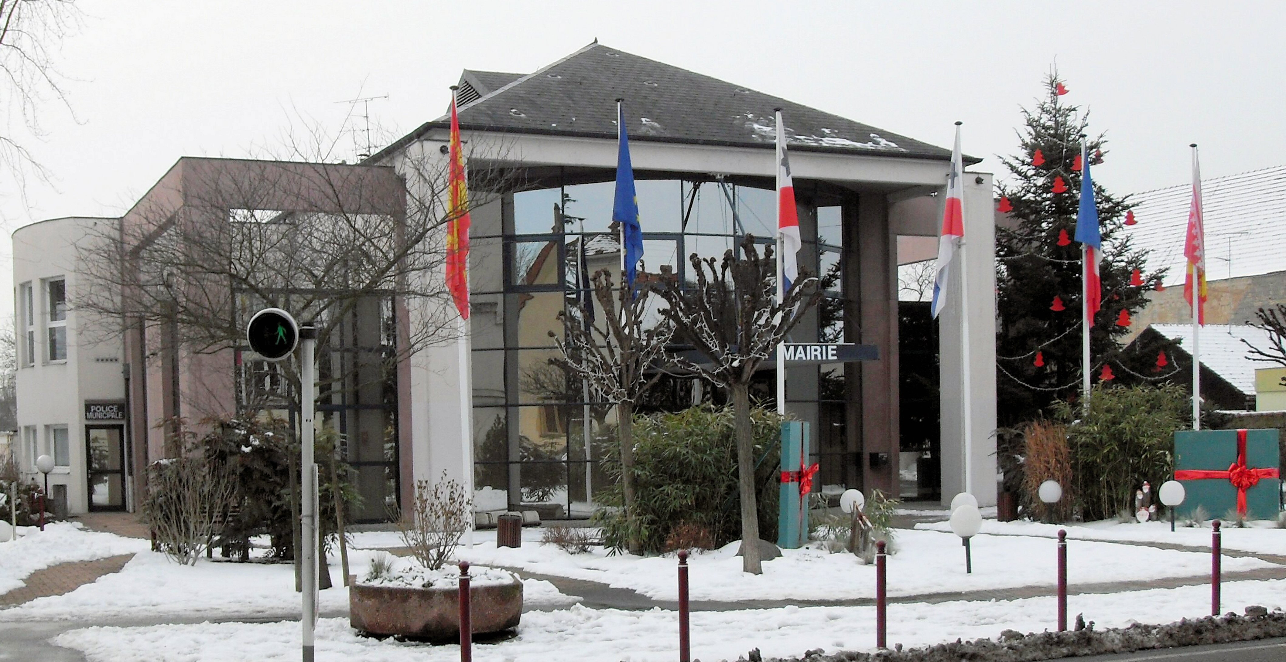 La mairie de Horbourg-Wihr